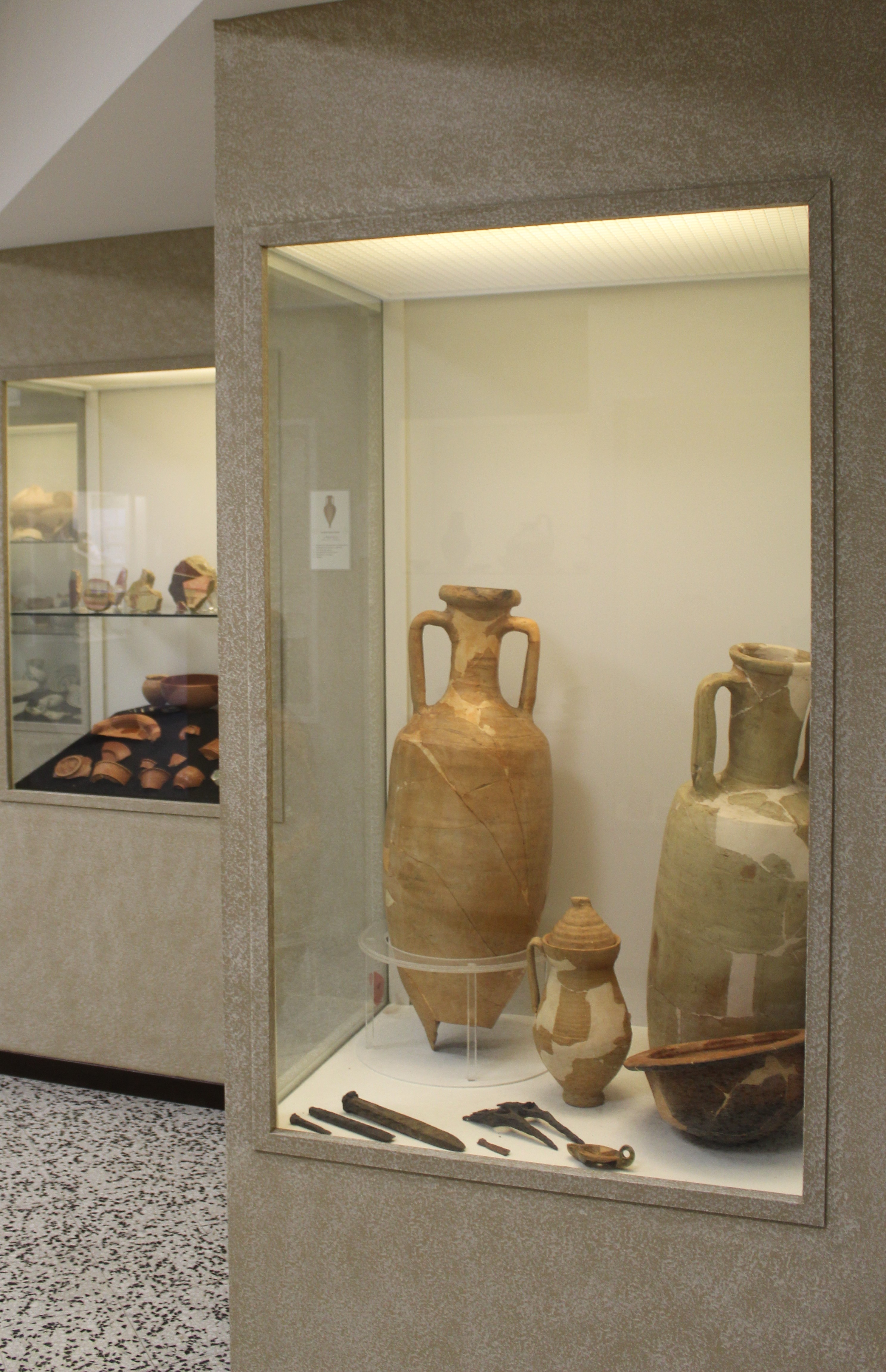 Anfore vinarie, secondo piano, sala 3 del Museo Civico Archeologico di Magliano Sabina